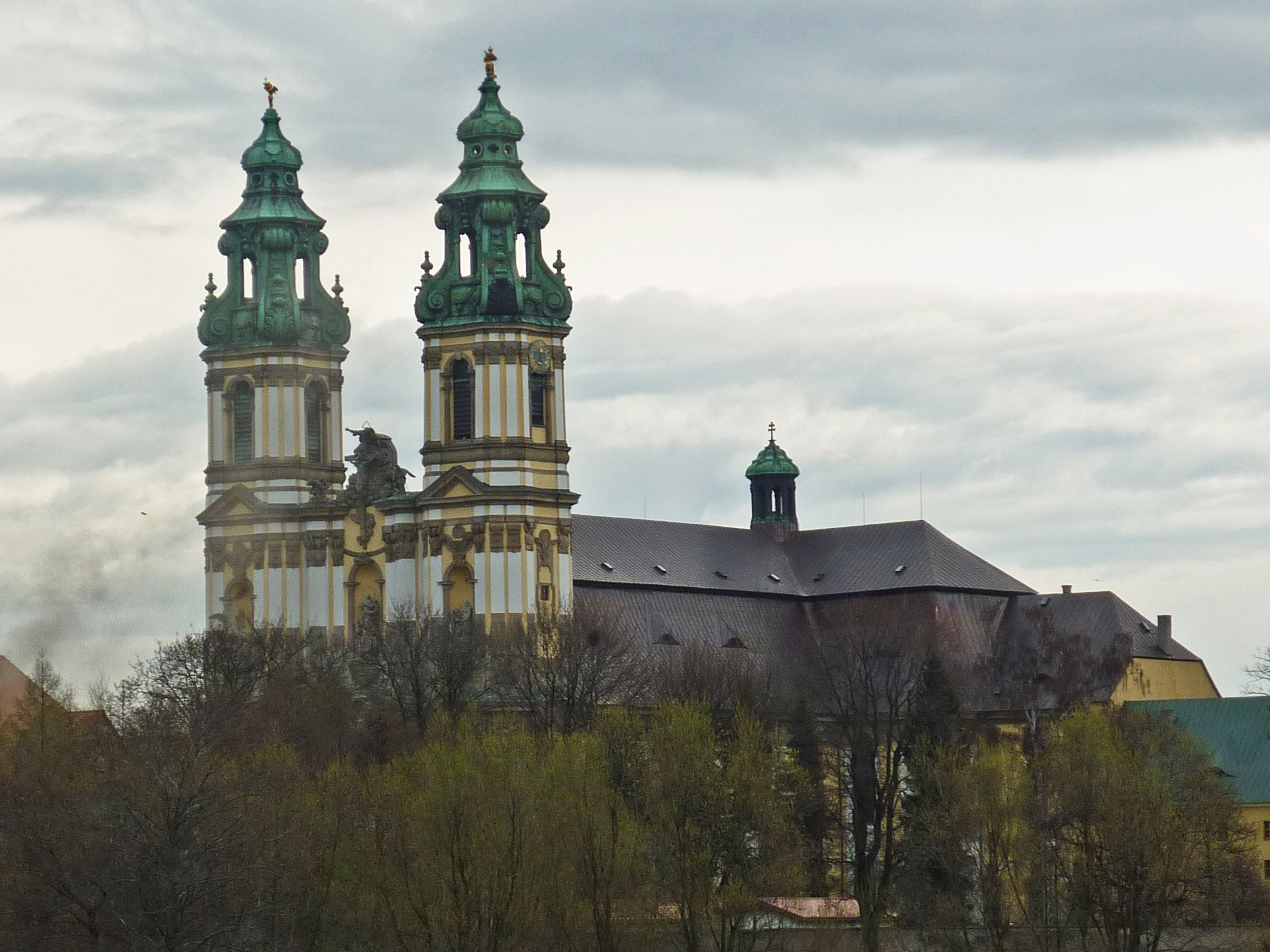 Krzeszów - Bazylika Wniebowzięcia Najświętszej Maryi Panny, dawniej kościół klasztorny NMP Łaskawej (zabytek nr rejestr. A/1989/489 z 20.02.1959)